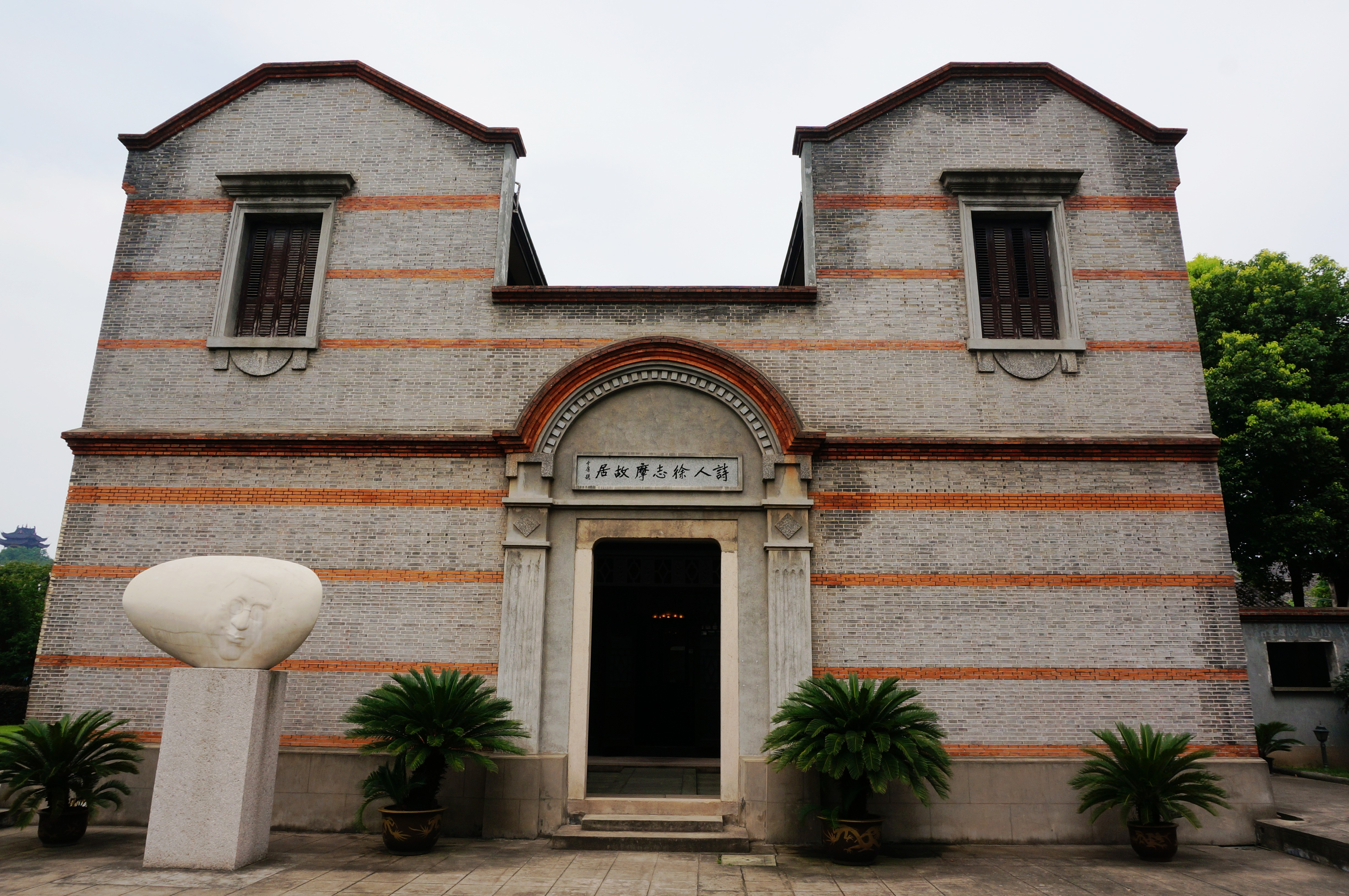 海宁徐志摩故居，主楼南侧。